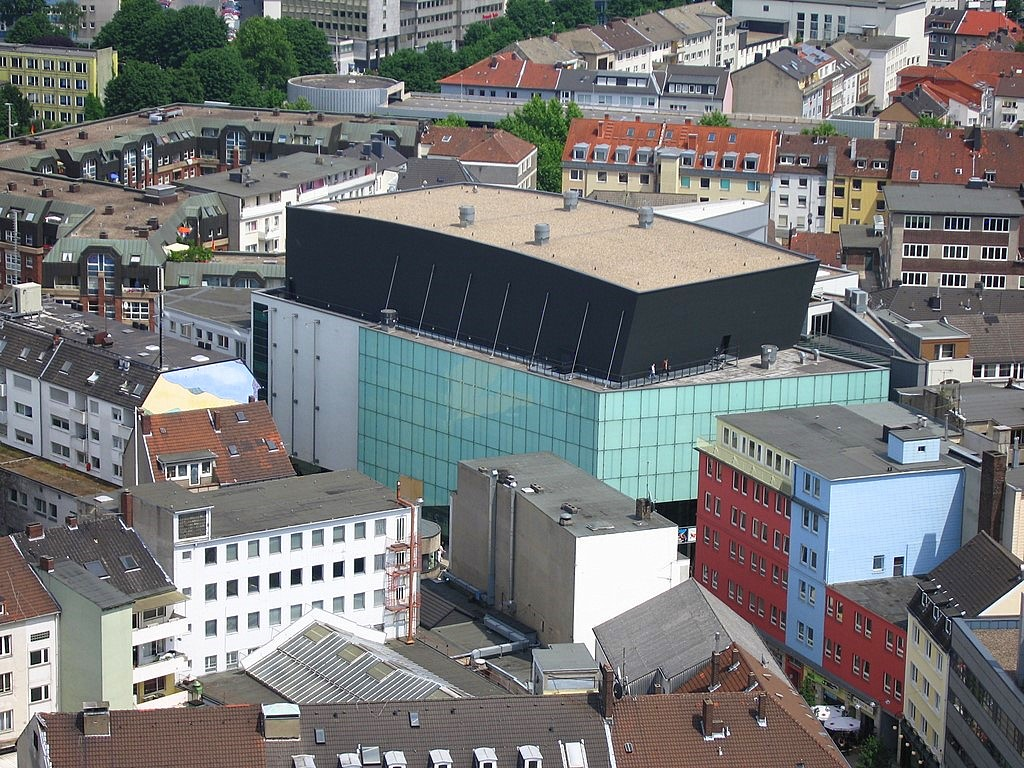 Konzerthaus Dortmund vom RWE Tower fotografiert